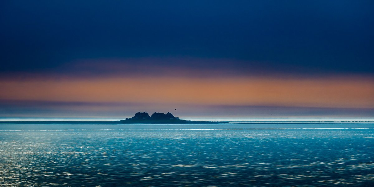 Westerwarft auf der Hallig Hooge